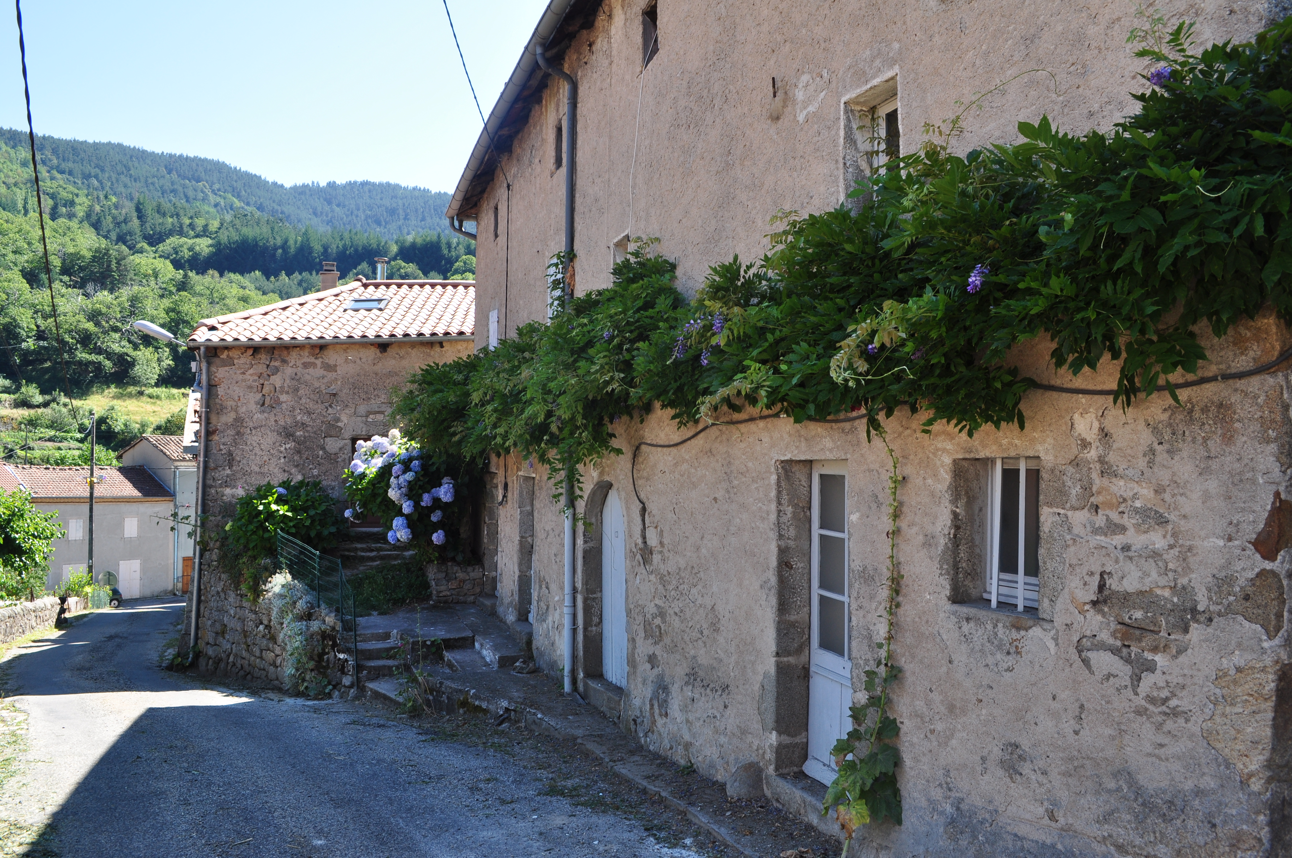 Une des plus ancienne maison d'Albon-d'Ardèche datée de 1668